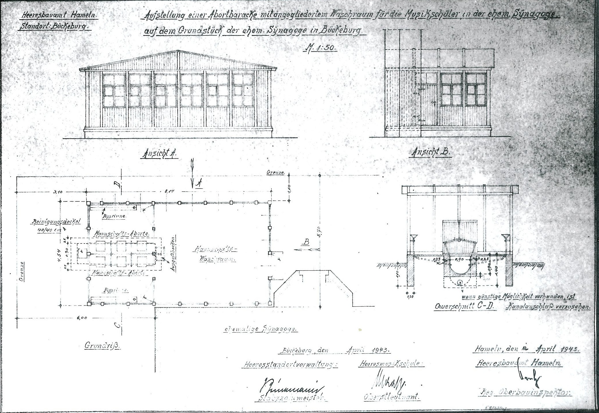 Planung für die Toilettenanlage als Neubau auf dem Grundstück der Alten Synagoge Bückeburg, da diese zur Heeresmusikschule umgenutzt werden sollte. Nie umgesetzt.